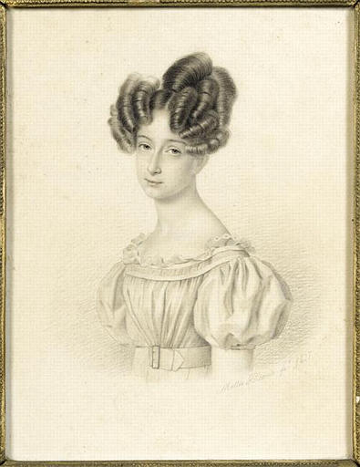 La Princesse Marie d'Orleans (1813-1839), future duchesseDE Wurtemberg, a l'age de quatorze ans